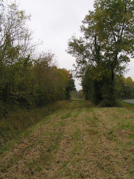 Voie Romaine (Via Agrippa Saintes-Lyon) entre Ste-Sévère et Cherves-Richemont, limite de commune avec Réparsac, Charente, France